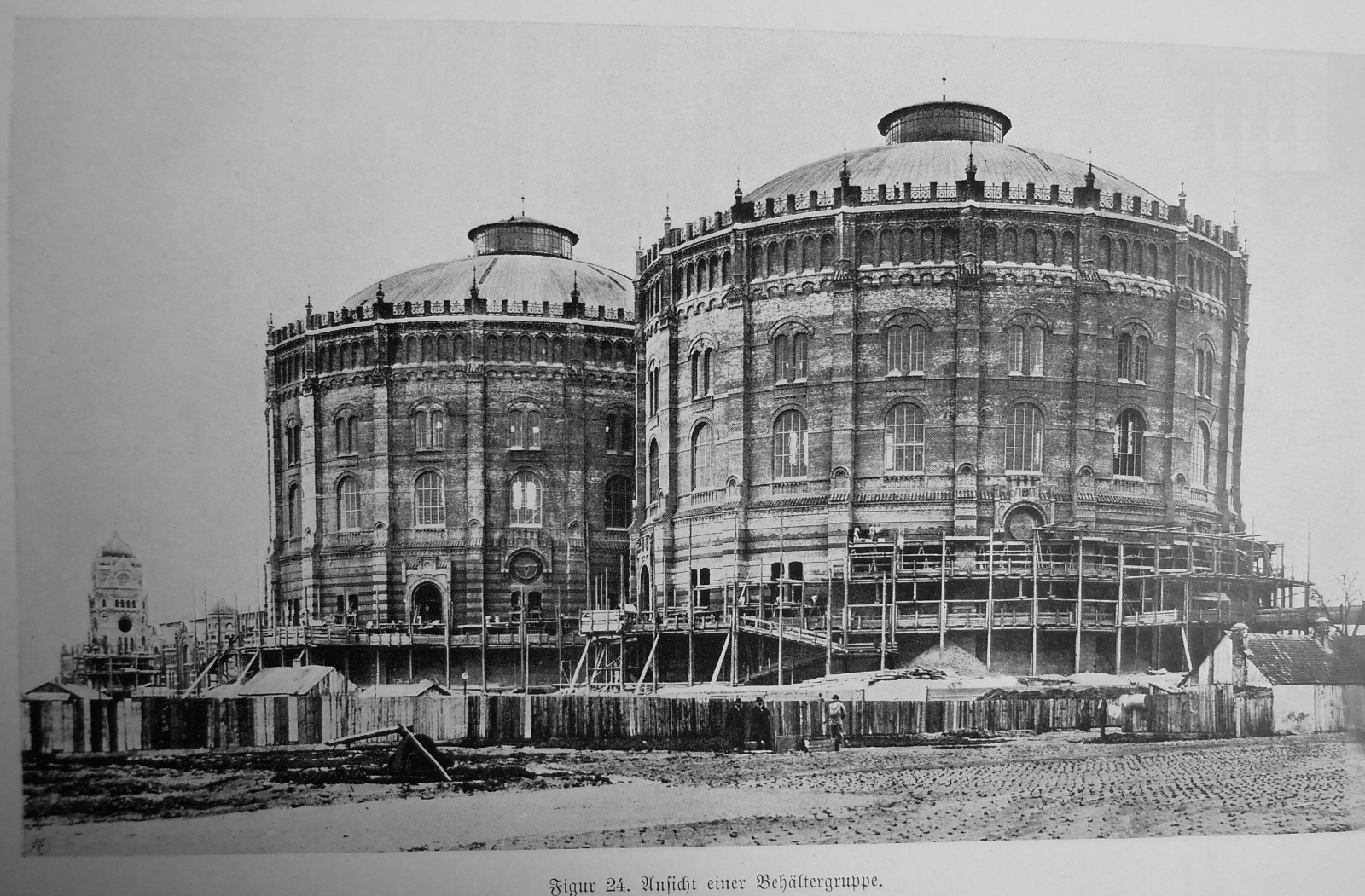 Gasometer Simmering: Figur 24. Ansicht einer Behältergruppe